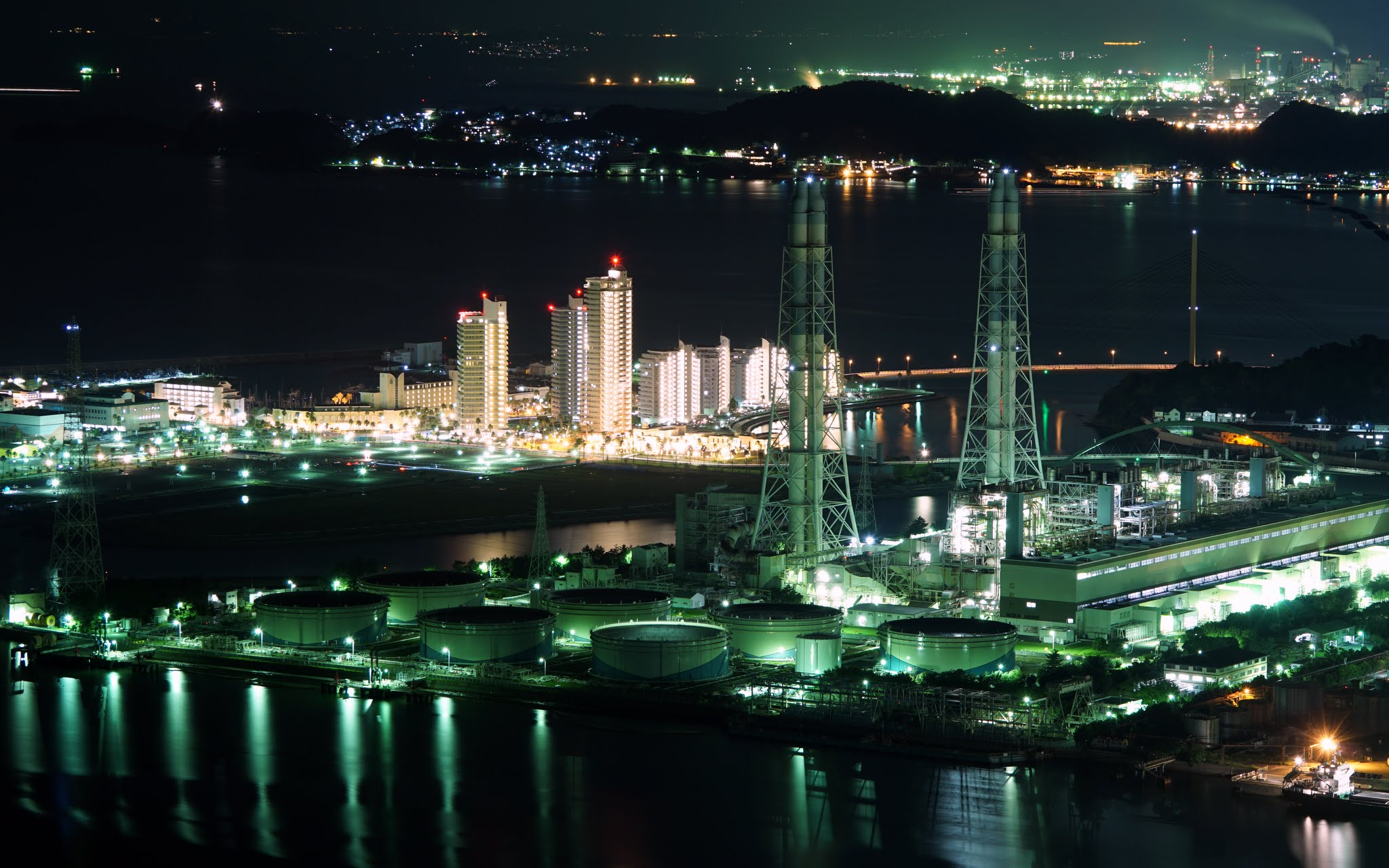 和歌山マリーナシティと海南発電所：地蔵峯寺「御所の芝」から見た夜景